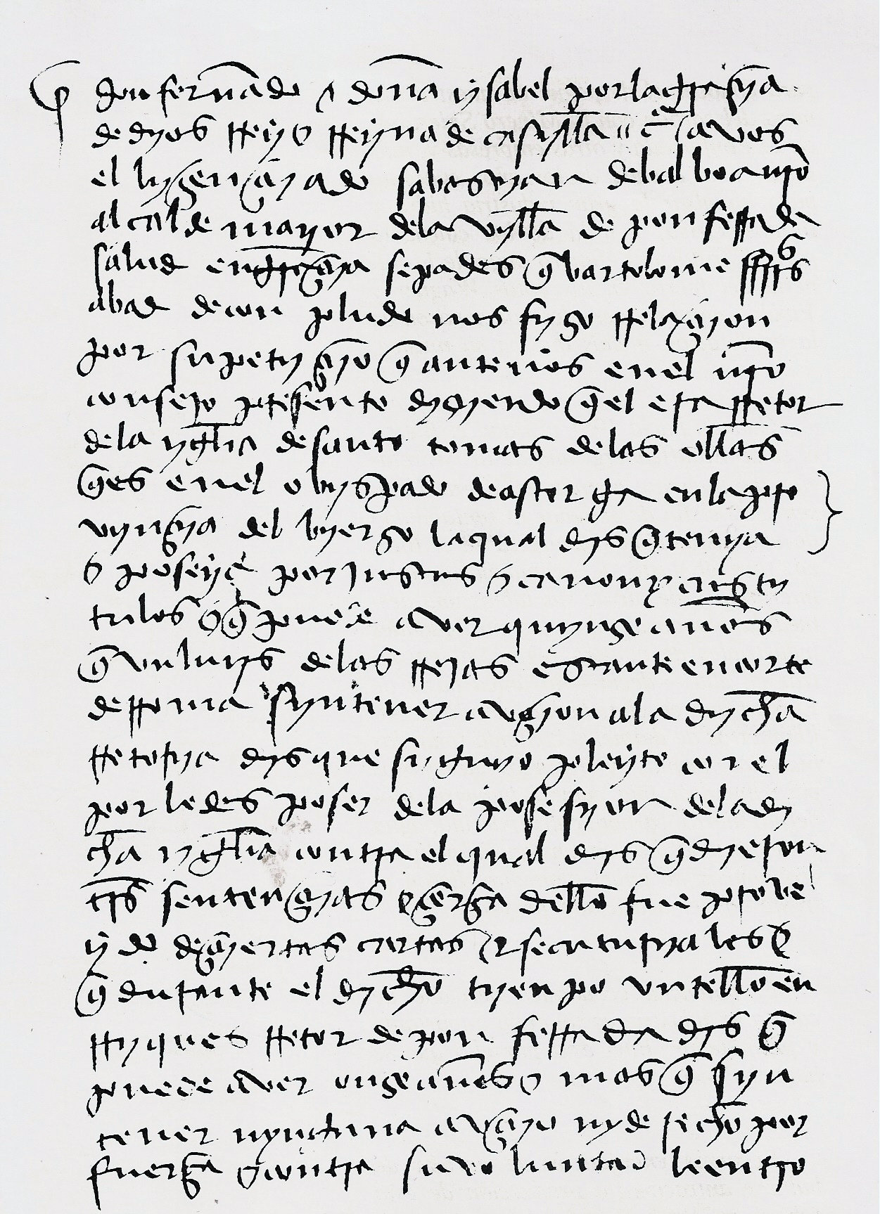 Carta de los Reyes Católicos, dada en Salamanca el 2-12-1486, en la que se habla sobre la Iglesia de Santo Tomás de las Ollas que se encuentra en la "provincia del Bierso" (sic)